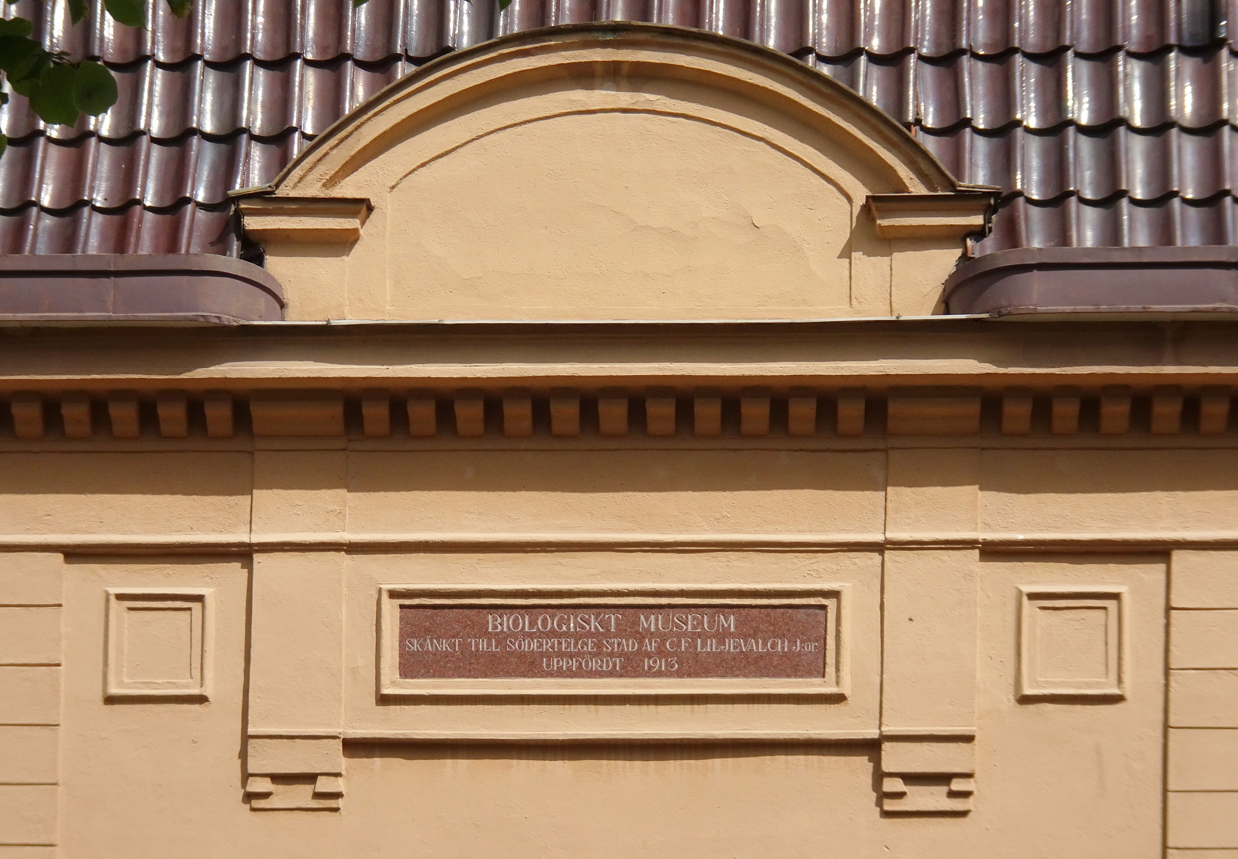 Biologiska museet Södertälje, skylt